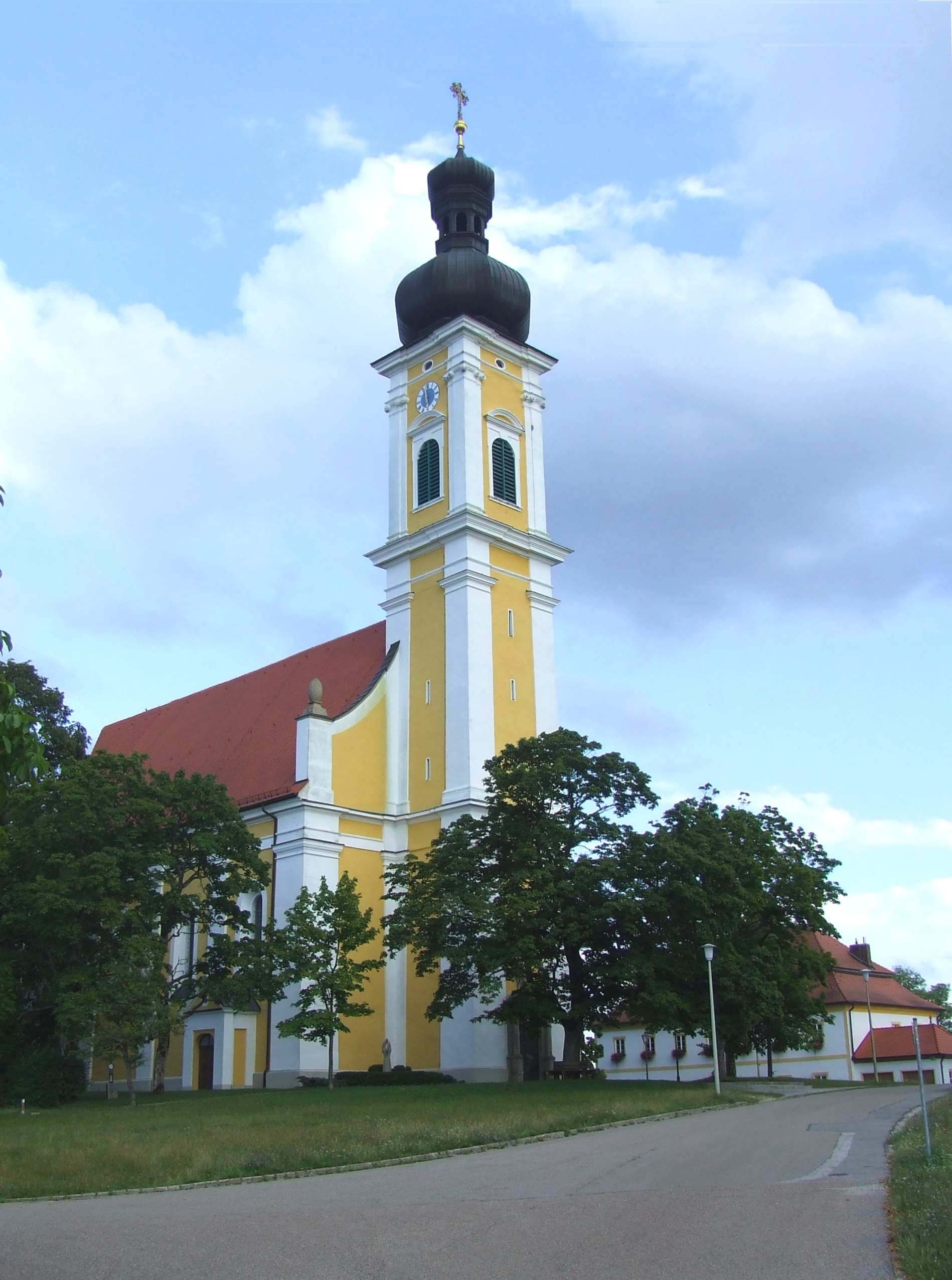 Außenansicht der barocken Wallfahrtskirche Eichlberg